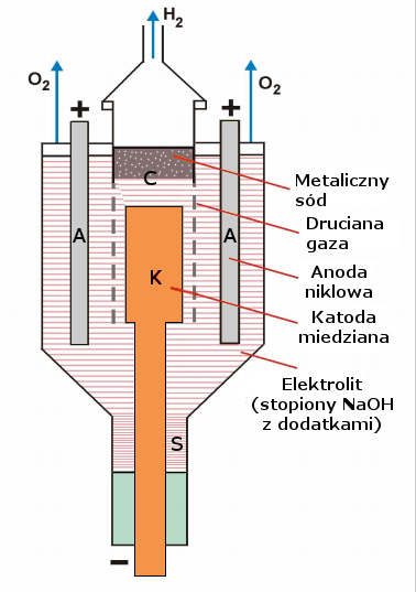 Schemat elektrolizera używanego w procesie Castnera-Kellnera do produkcji sodu.